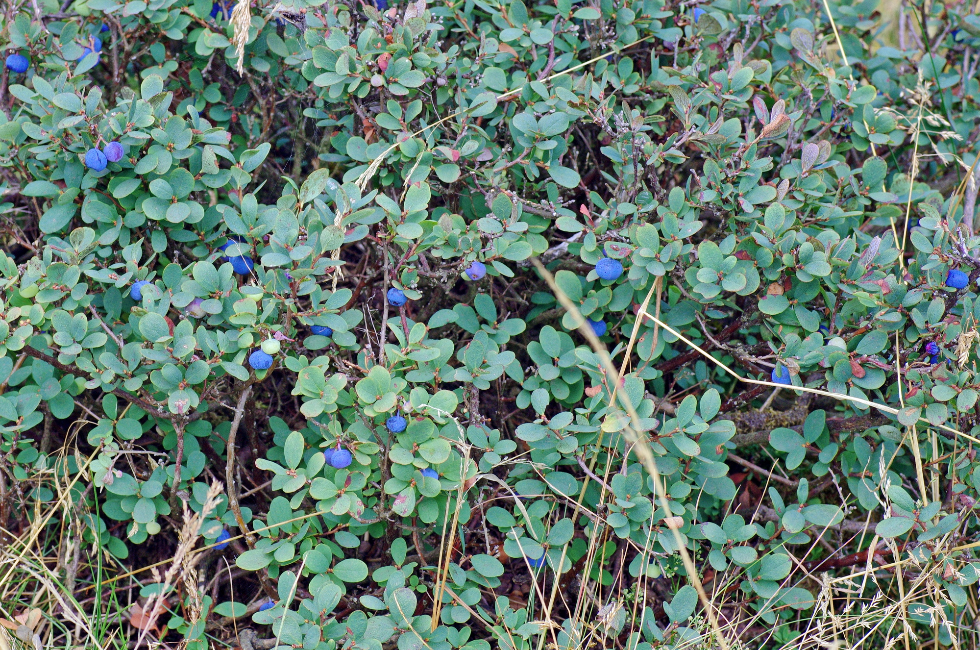 Přírodní rezervace Mokřady pod Vlčkem, vlochyně bahenní, Slavkovský les, okres Cheb